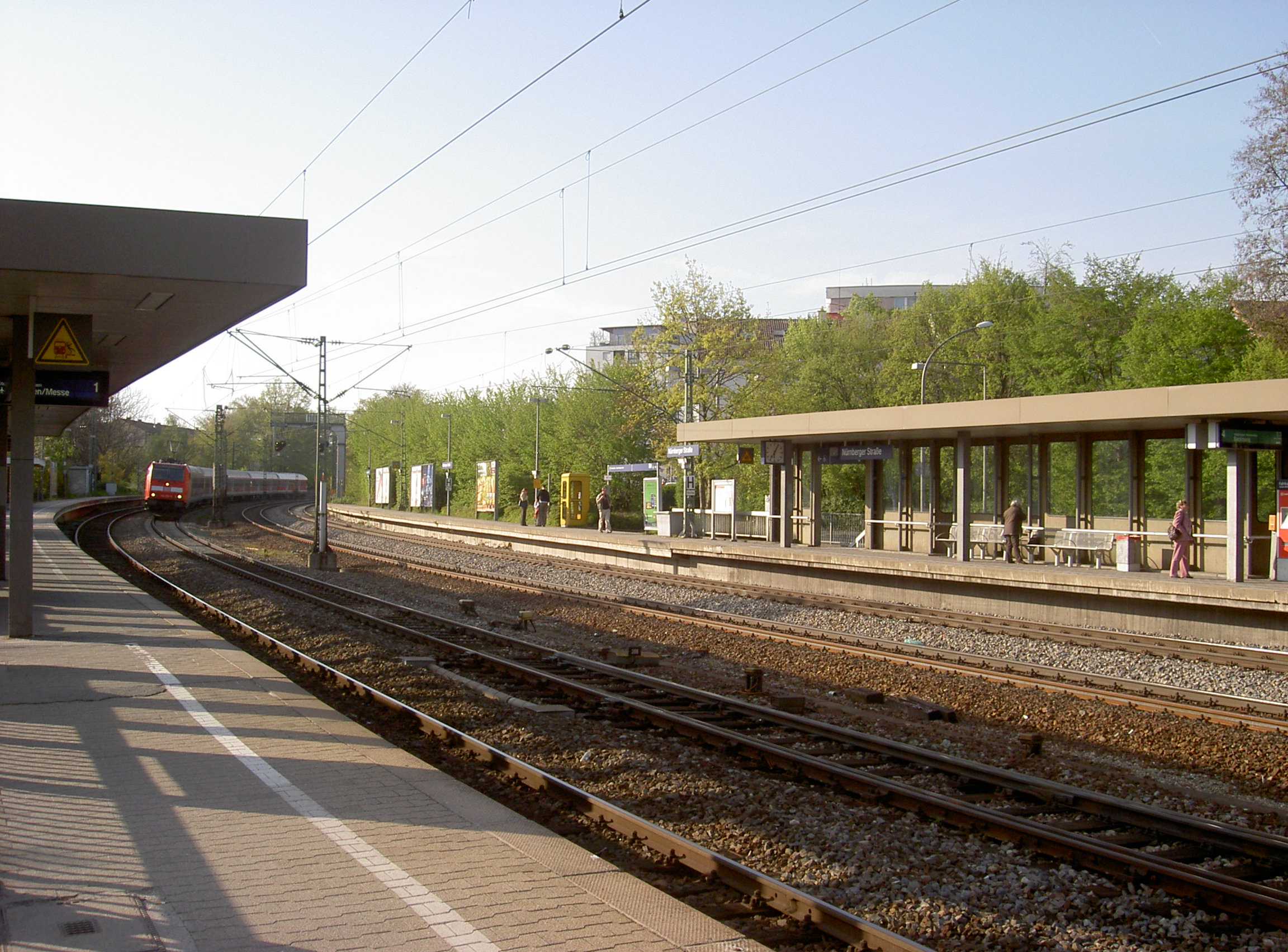 Haltepunkt Stuttgart Nürnberger Straße